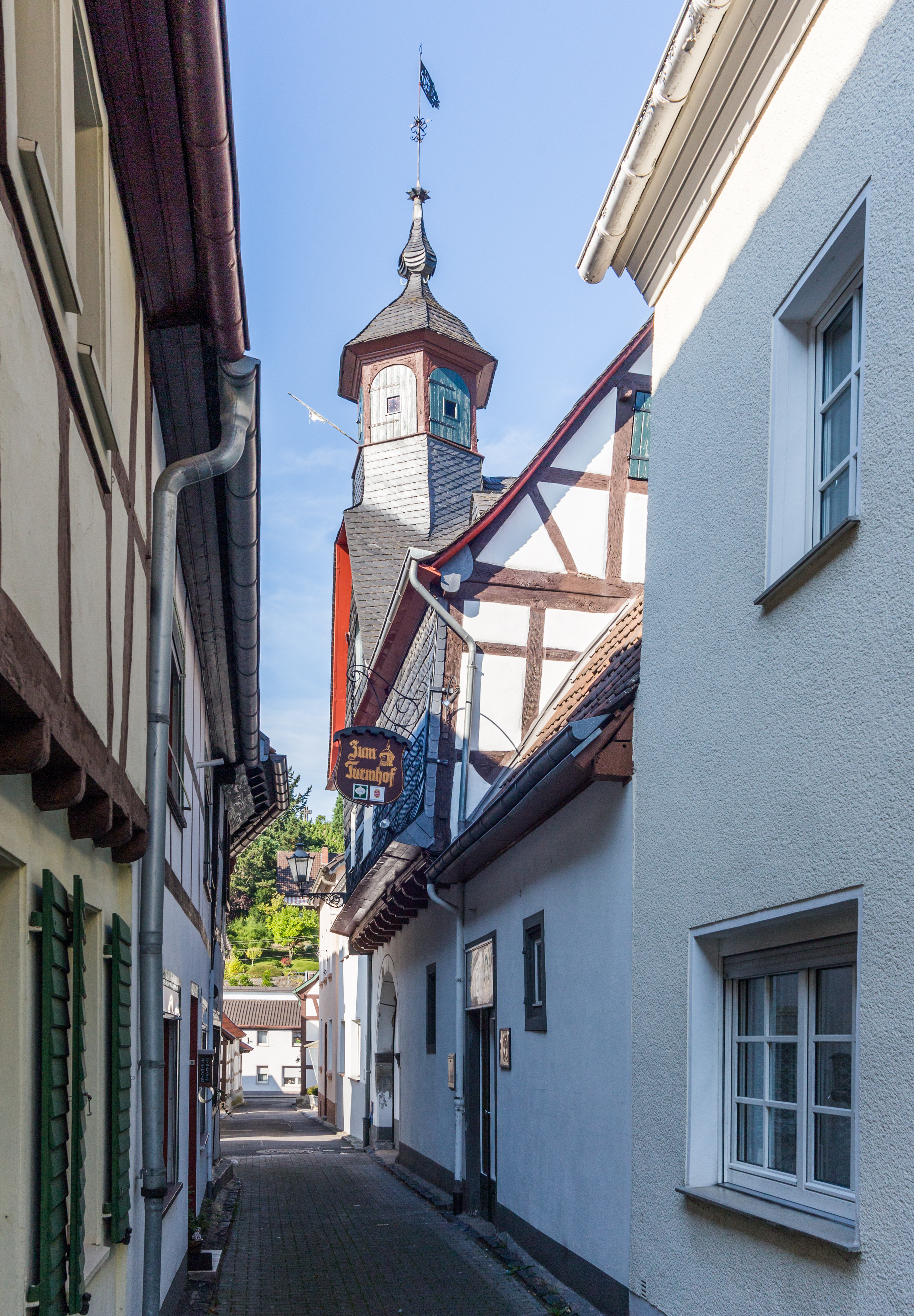 Turmhof, Turmstraße 4, Königswinter-Oberdollendorf This is a photograph of an architectural monument. 29